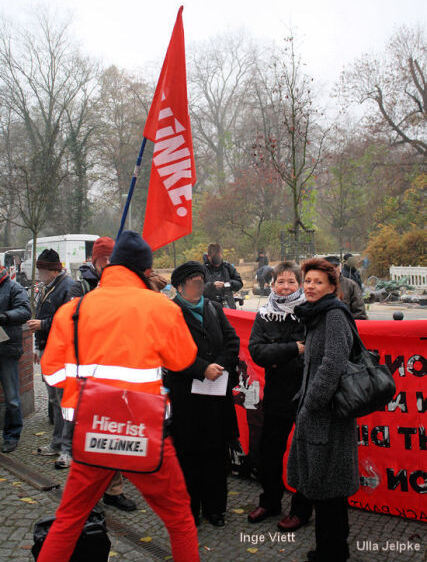 Inge Viett (ehemalige RAF-Terroristin) und Ulla Jelpke (Politikerin der Linkspartei) auf einer Demonstration.